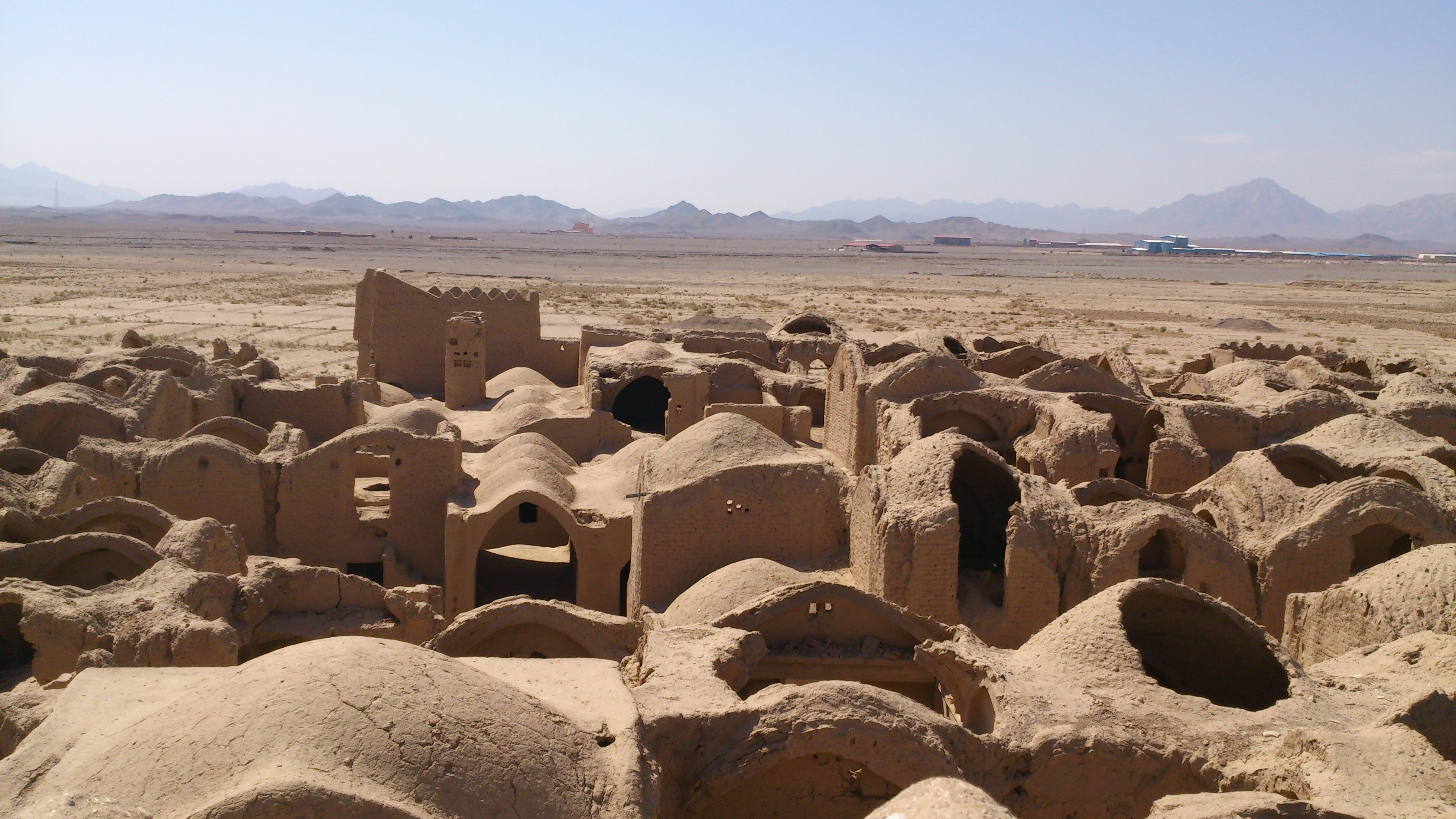 قلعه سر یزد